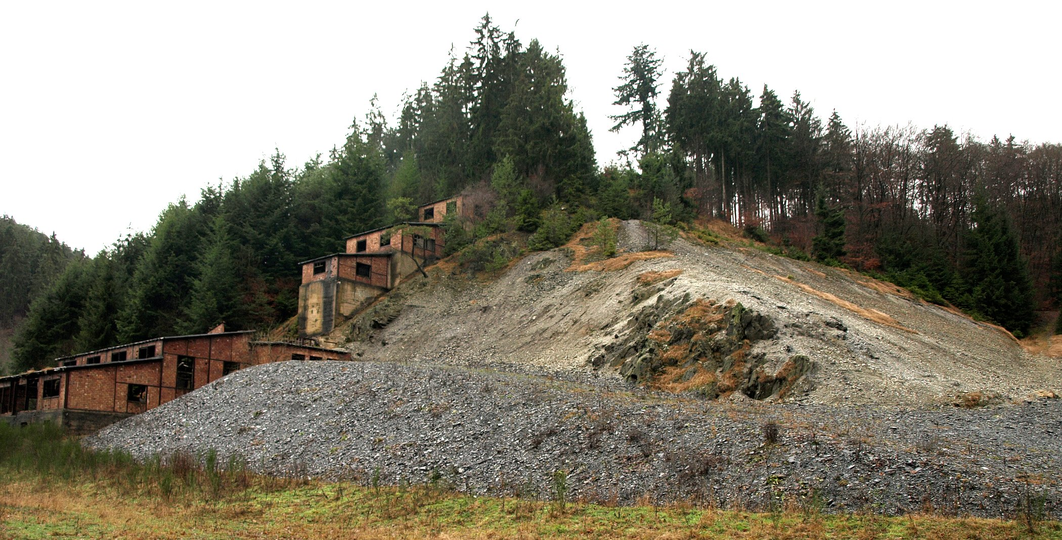 Altlay, Grube Barbarasegen Gebäude im starken Verfall inbegriffen und teilweise verwüstet